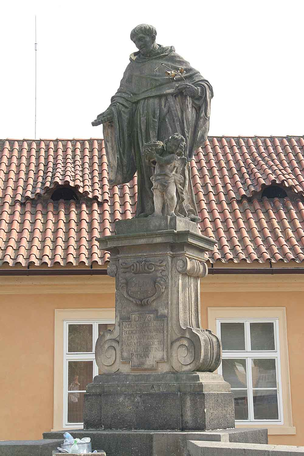 Česky: Sousoší Svatého Mikuláše Toletinského na Karlově mostě